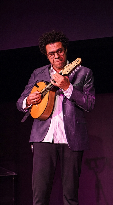 Paris - Hamilton de Hollanda participa da abertura da exposição Guerra e Paz, no Grand Palais, em Paris. 06.05.2014. Foto: Fernanda Peruzzo/Ministério da Cultura